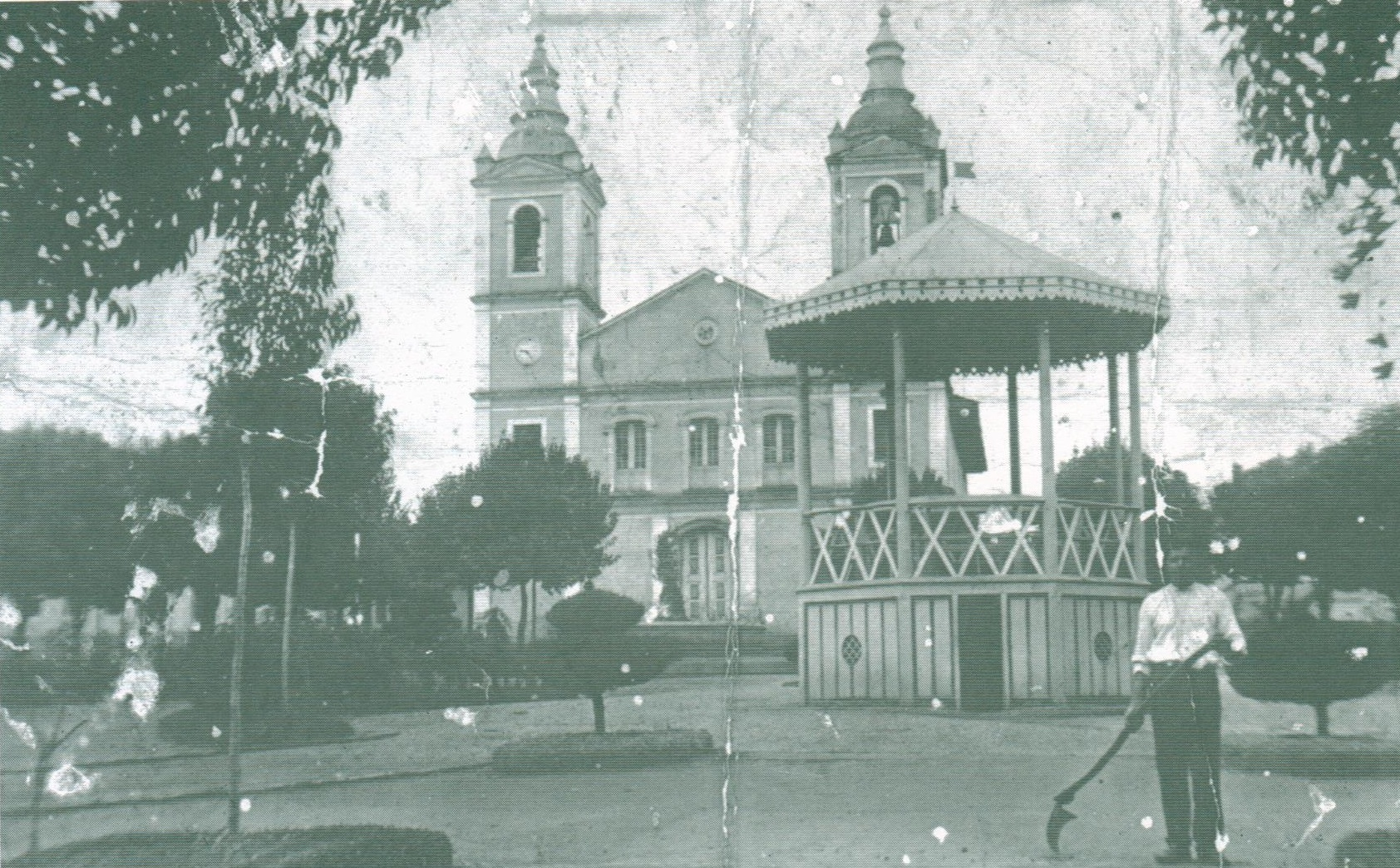 A praça com jardim"a Versailles" Próximo á entrada da igreja havia um chafariz e um belo coreto no centro. (1910)